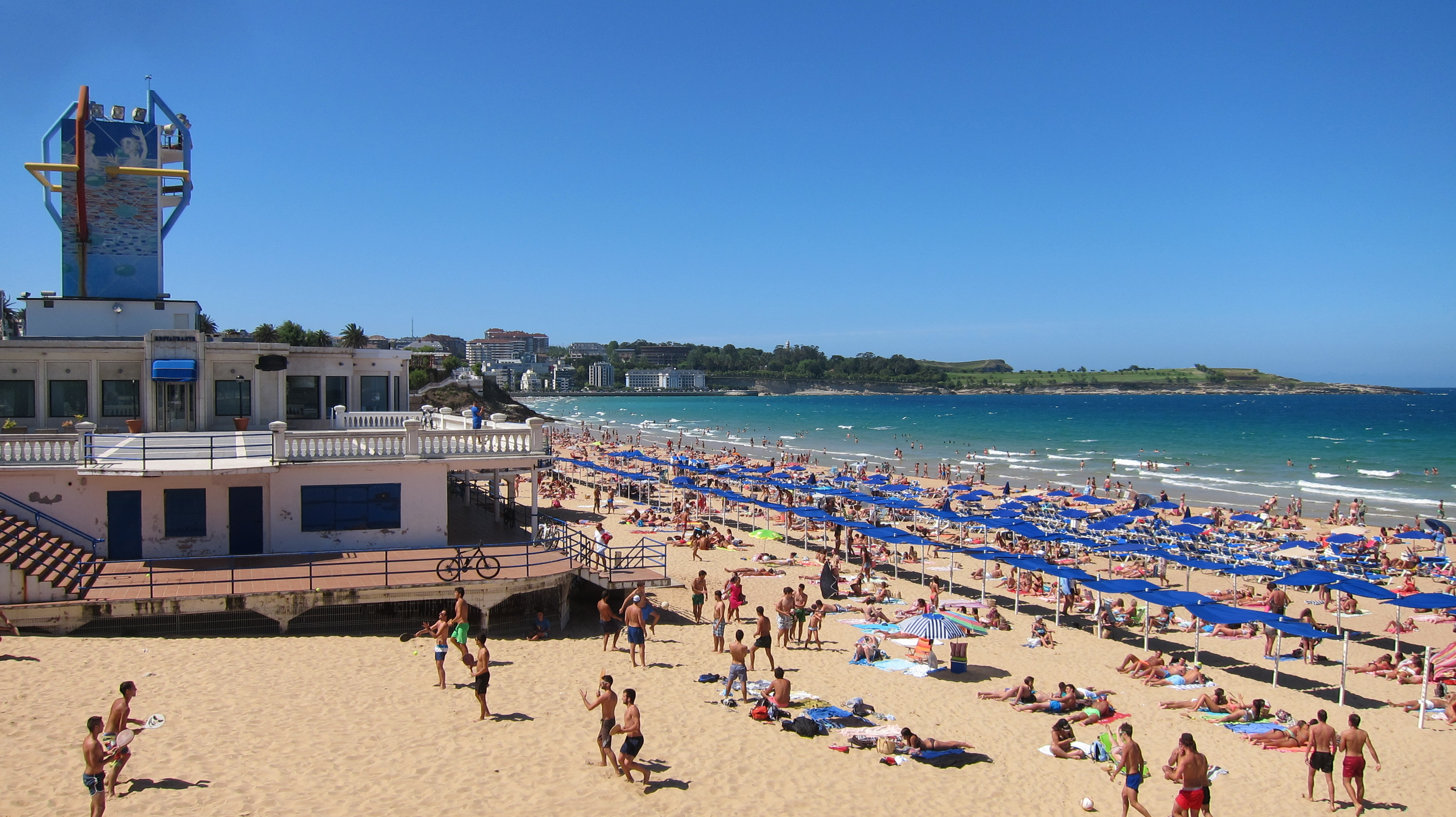 playa el sardinero santander